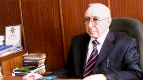 director